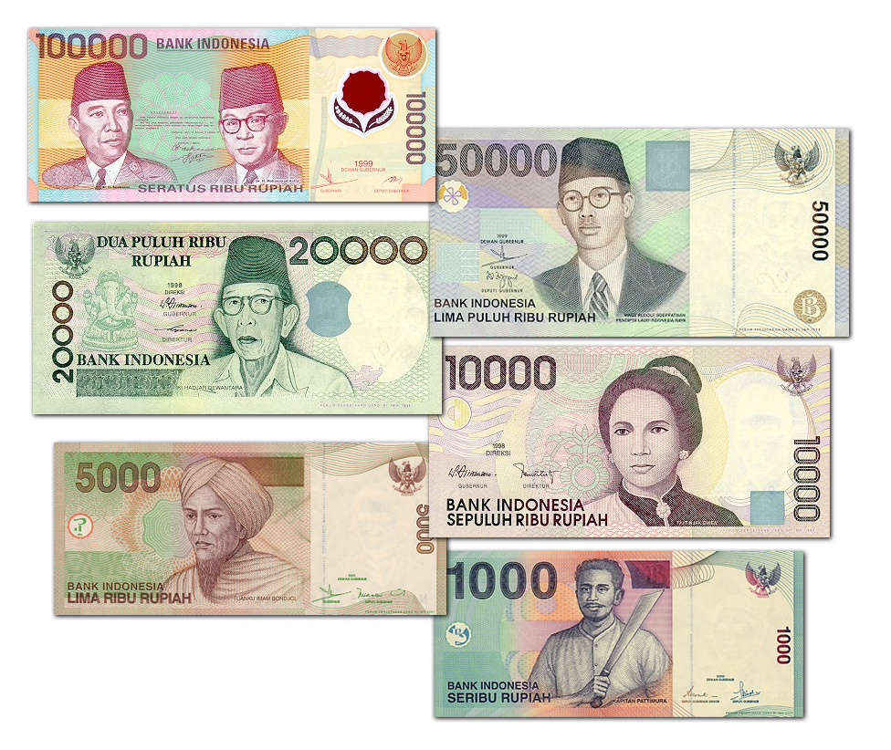 caricato su wiki da User:*drew con lo stesso nome e la seguente descrizione Non-free media rationale | Description = Currently issued Indonesian banknotes | Source = | Portion = All | Resolution = |Article=Indonesian rupiah | Purpose = To illustrate the notes | Replaceability = No | other_information = image:Indonesian Rupiah.jpg Categoria:Immagini di banconote